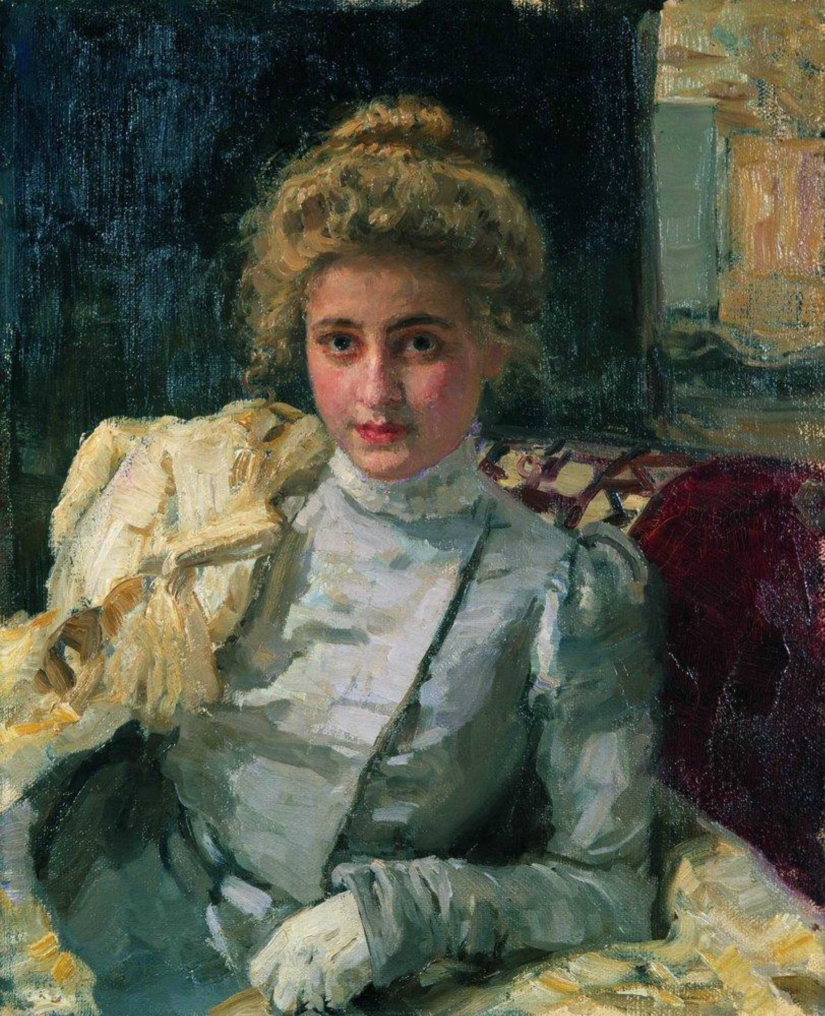 Блондинка (Портрет Ольги Тевяшевой)